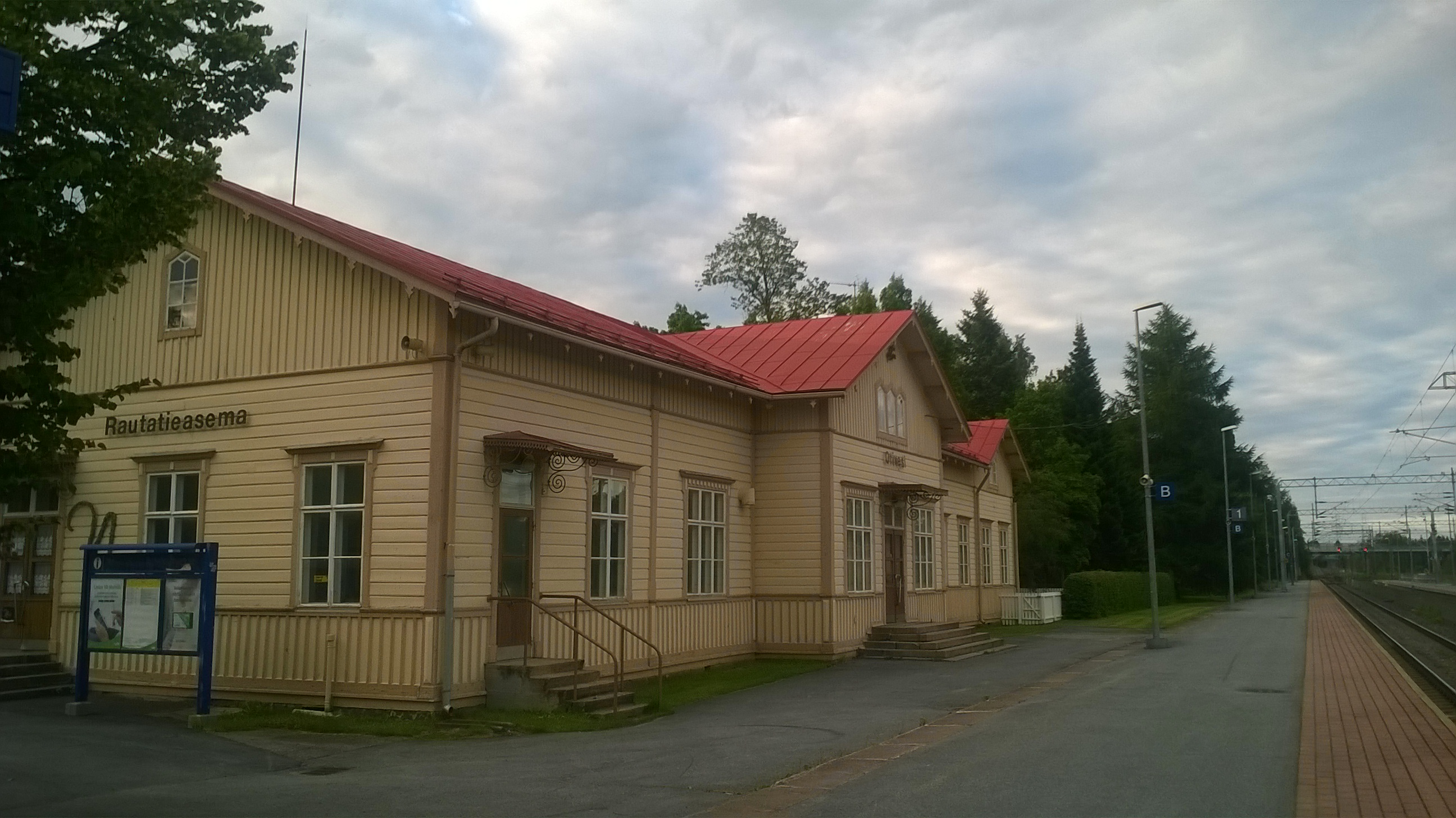 Oriveden rautatieasema; railway station in Orivesi, Finland